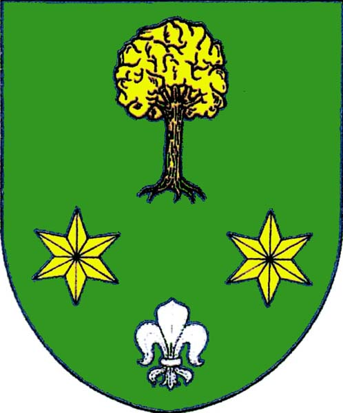 Znak obce Katov